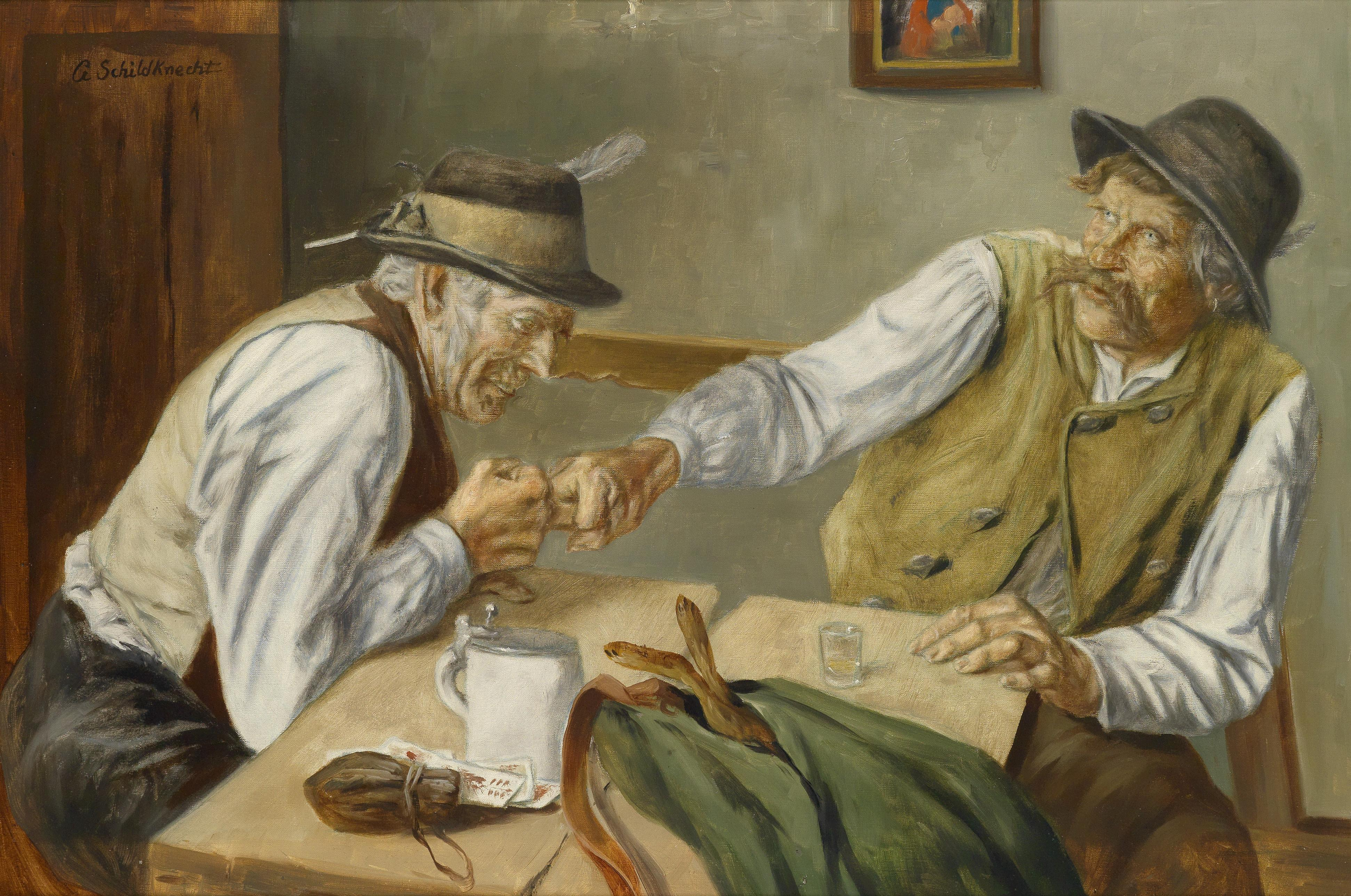 Fingerhakeln, signiert G. Schildknecht, Öl auf Leinwand, 50 x 70 cm